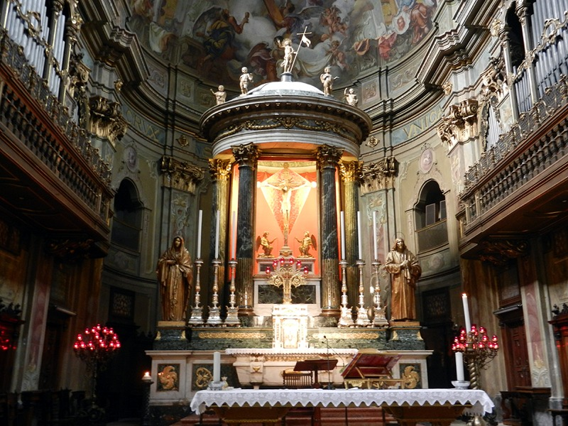 Como - Il crocifisso miracoloso all'interno del Santuario del Santissimo Crocifisso